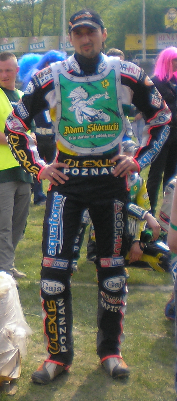 Rafał Dobrucki w Poznaniu na turnieju z okazji 15-lecia startów Adama Skórnickiego